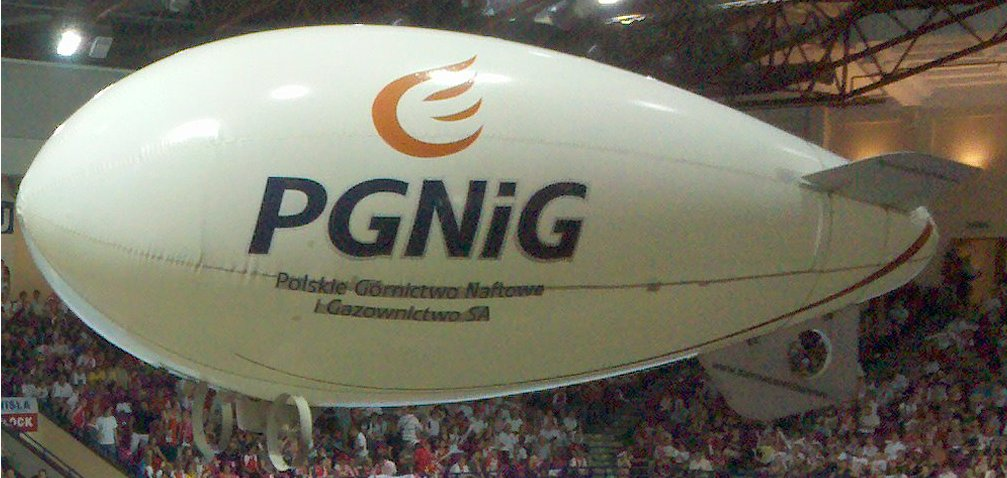 Sterowiec reklamowy PGNiG